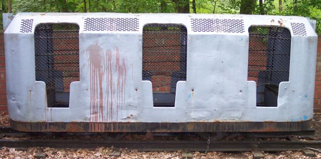 Personenwagen einer Grubenbahn.